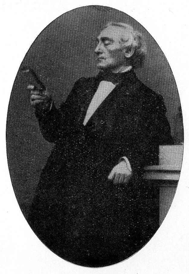 Carl Künzel. Fotografie aus dem Besitz Eduard Mörikes